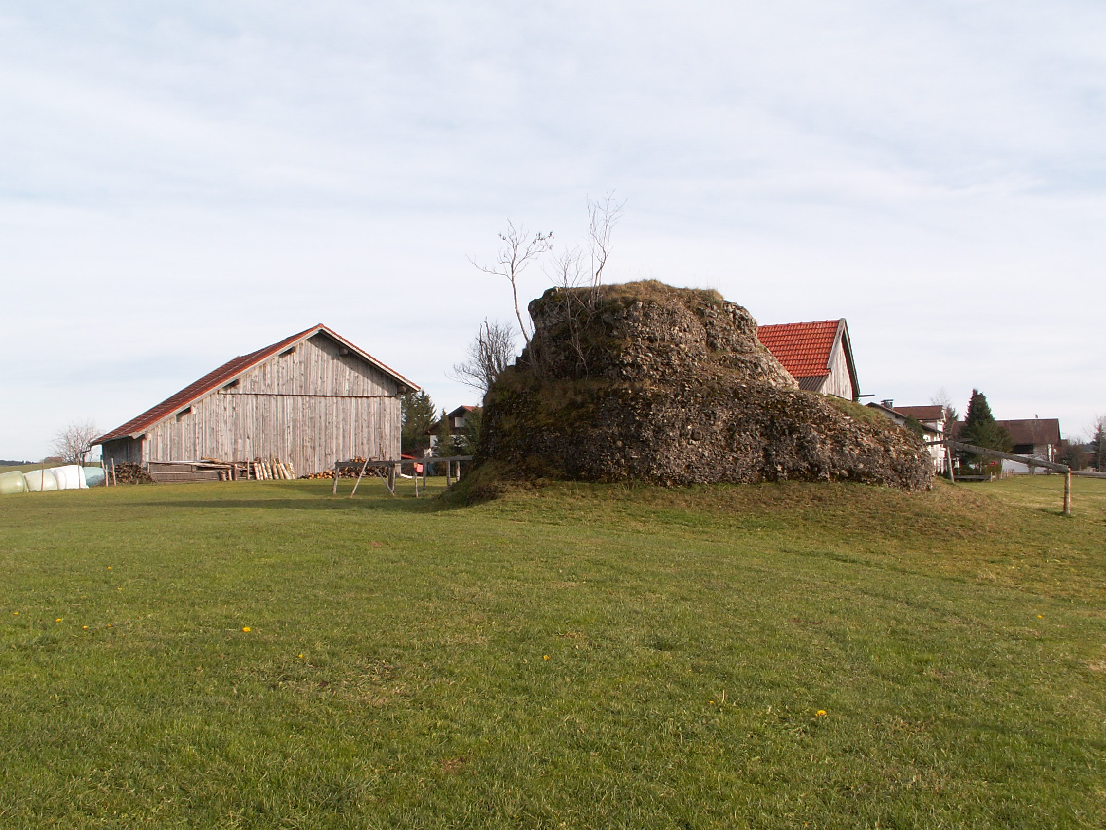 Nagelfluhfindling westlich Görisried